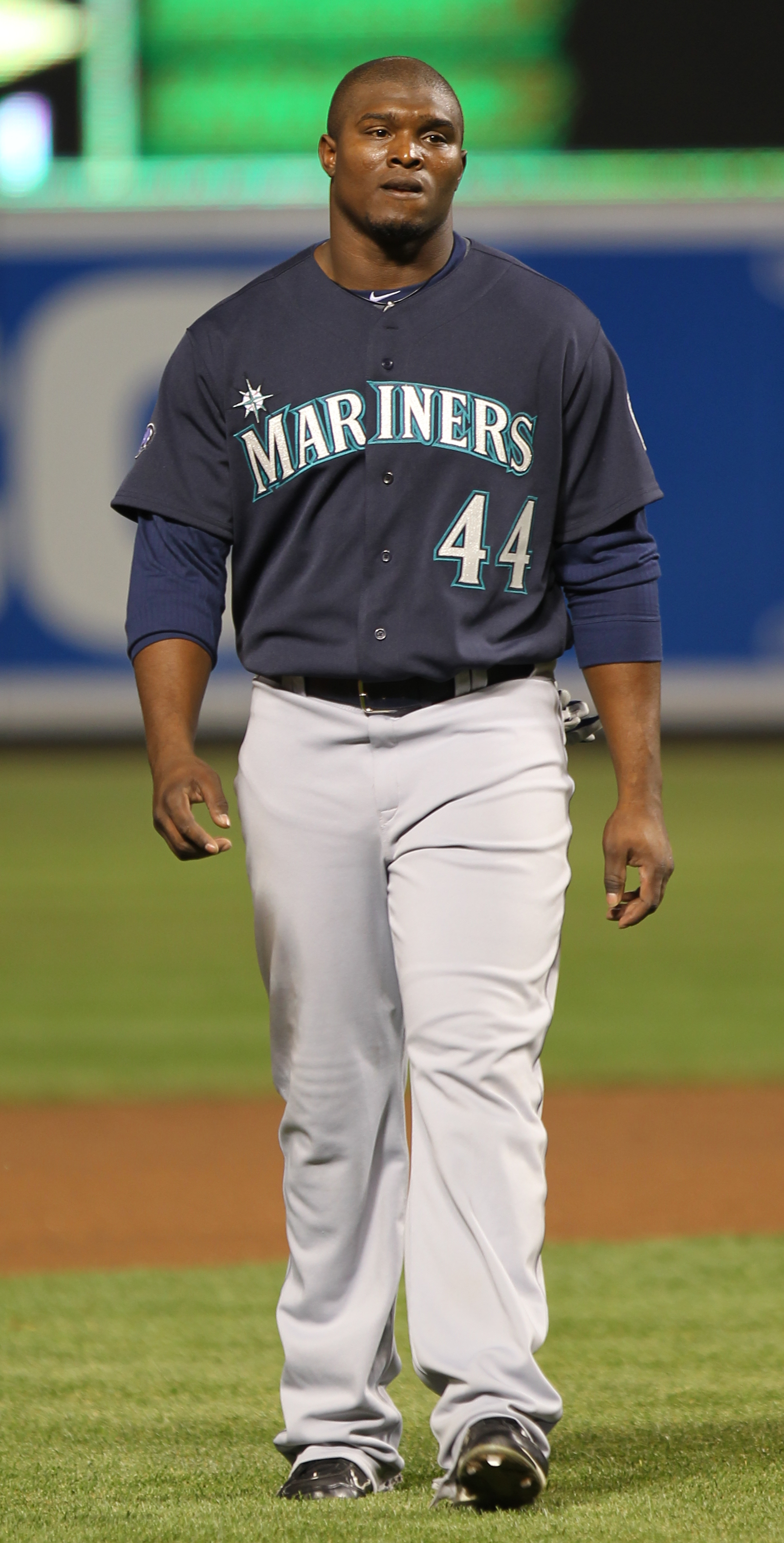 Mike Wilson